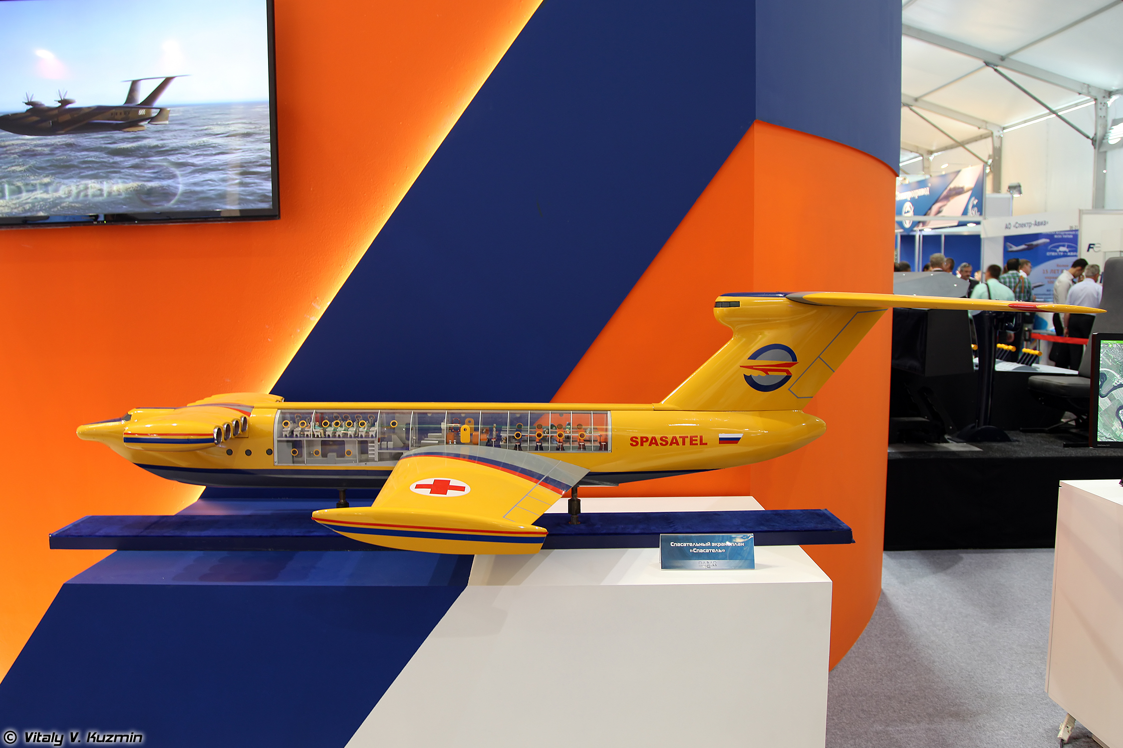 Модель экраноплана Спасатель (Model of Spasatel WIG craft)